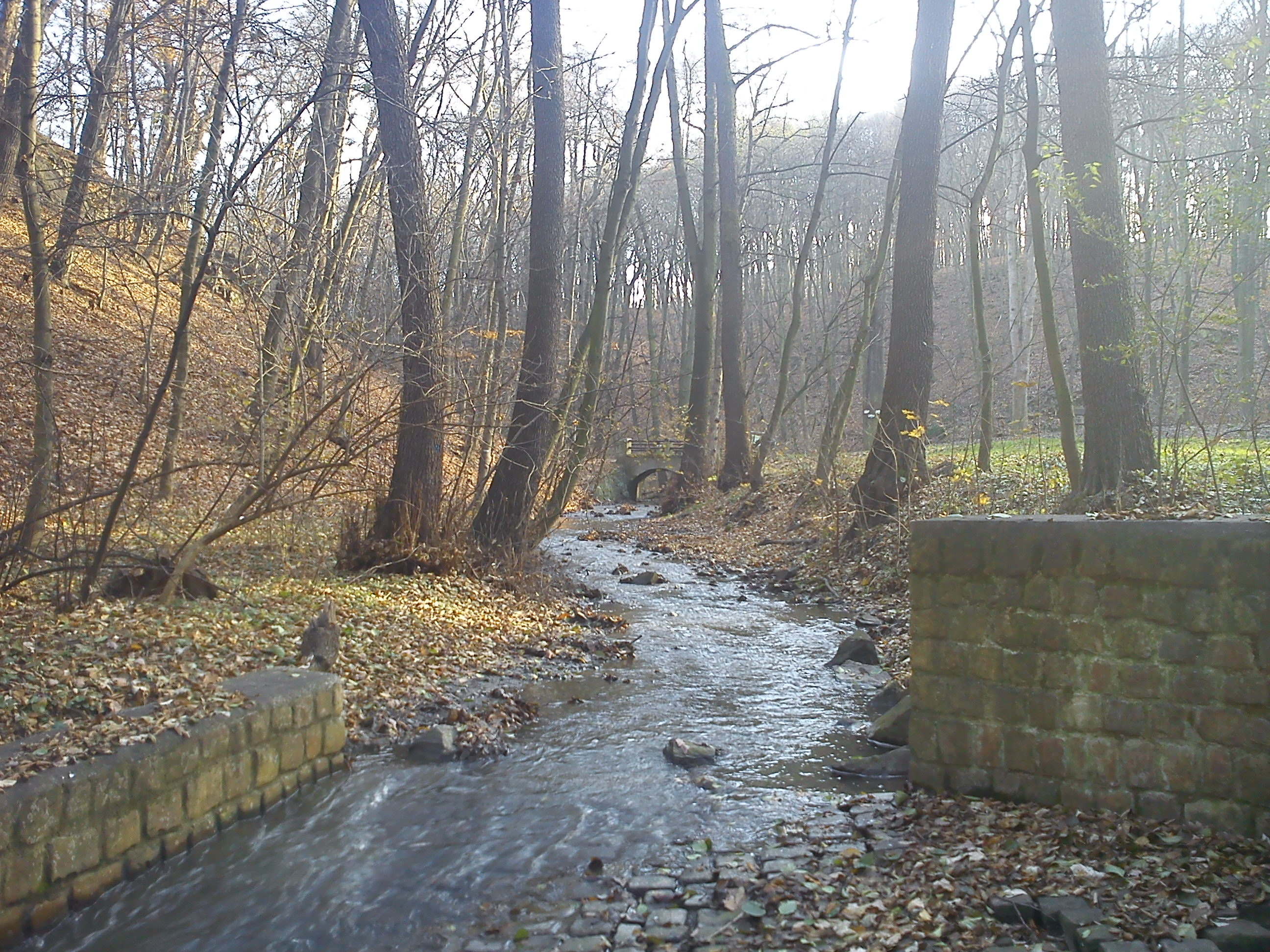 pohled na malý jez Kunratického potoka